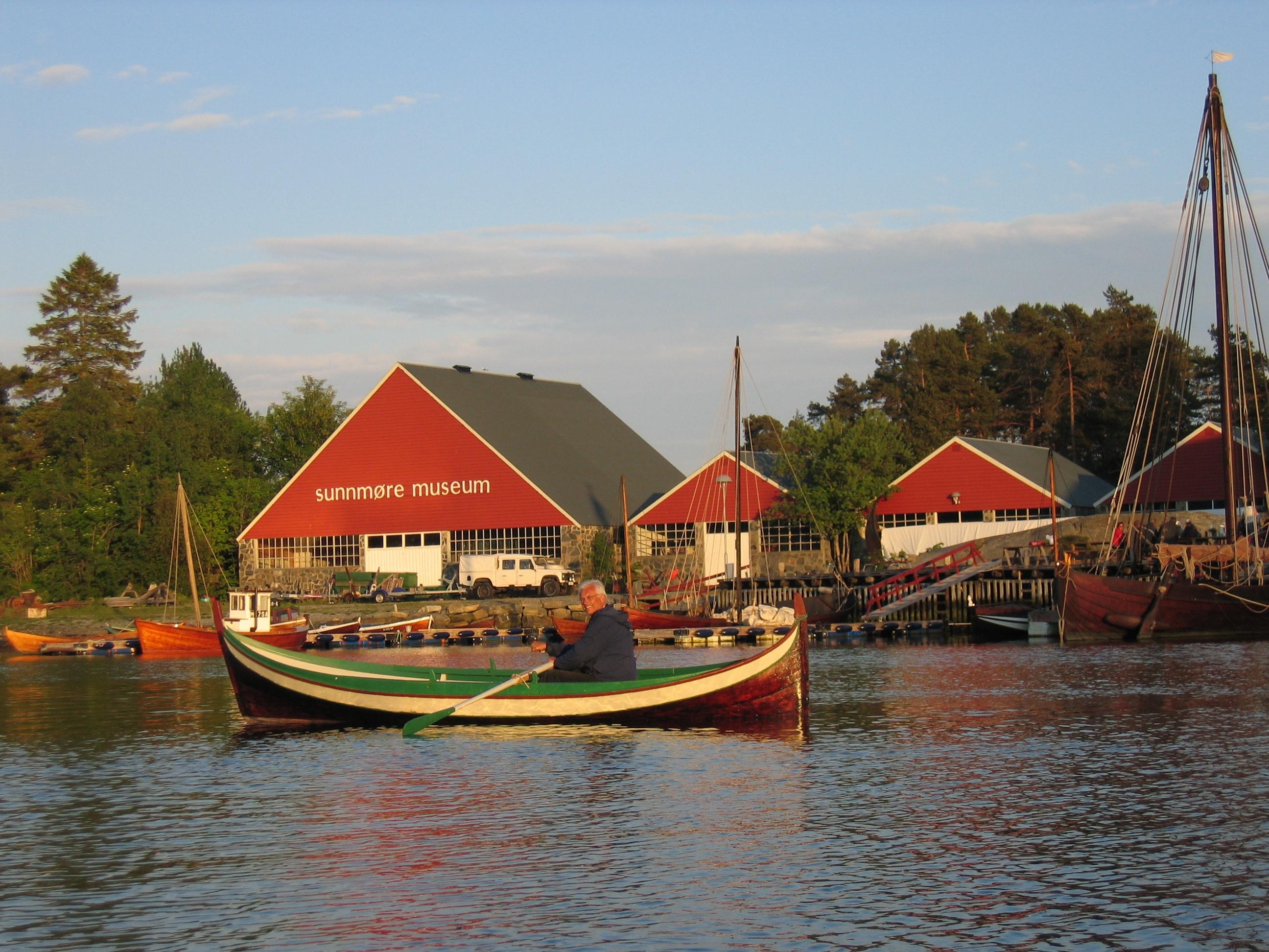 Båthallane til Sunnmøre museum i Ålesund